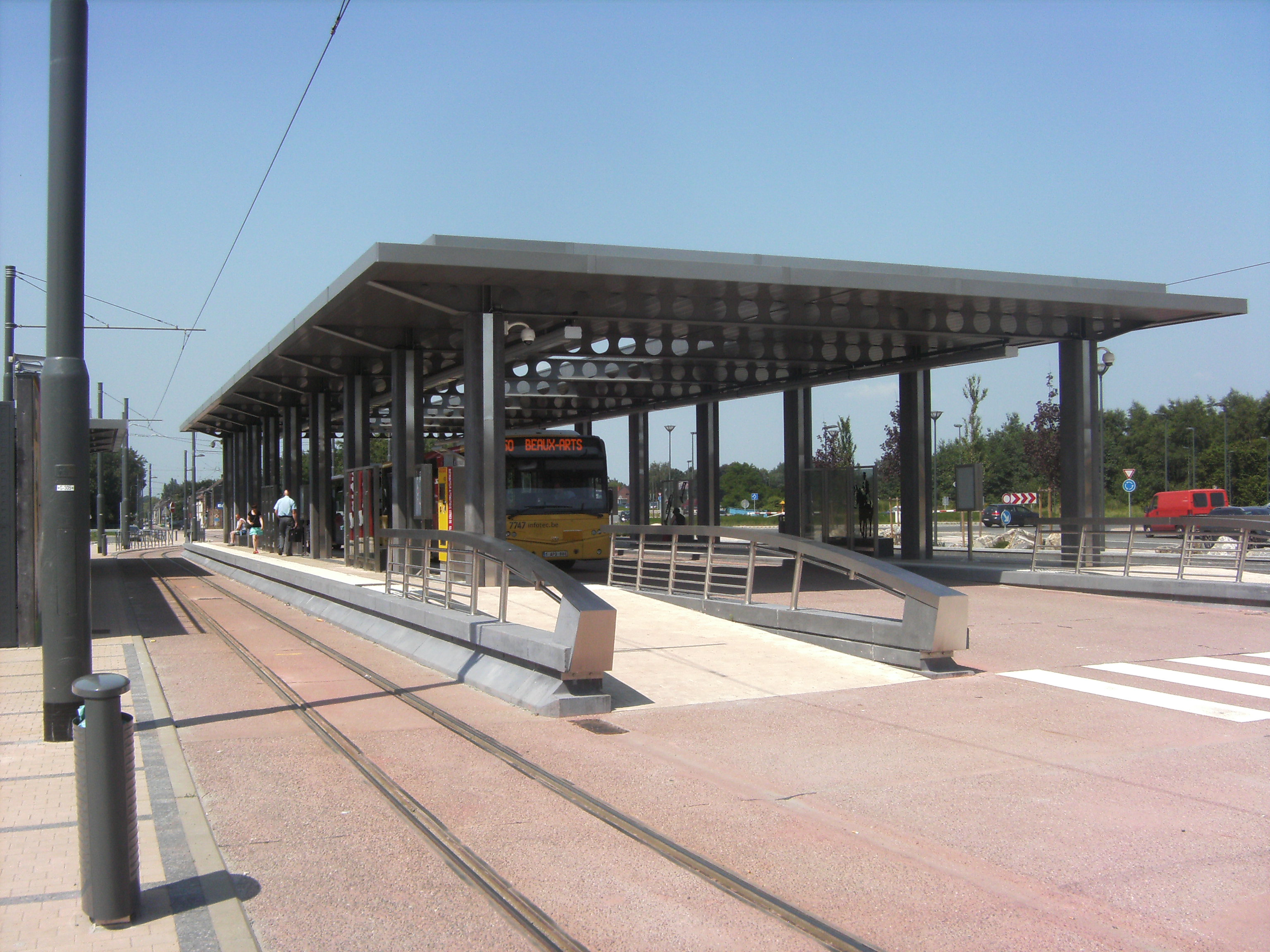 Madeleine metro station (Charleroi)